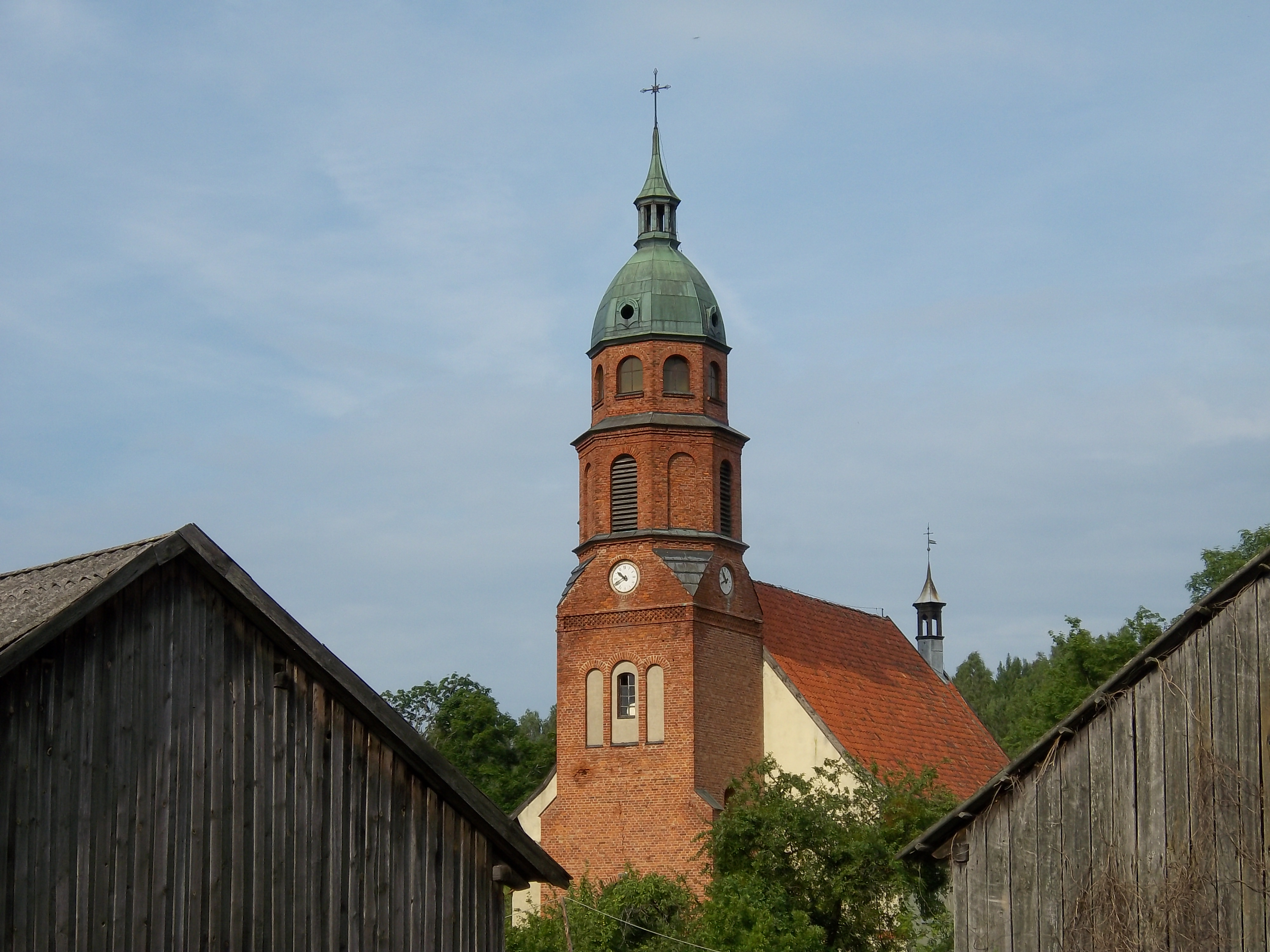 Kościół parafialny św. Jakuba Apostoła w Bartołtach Wielkich, widok od strony południowo-wchodniej